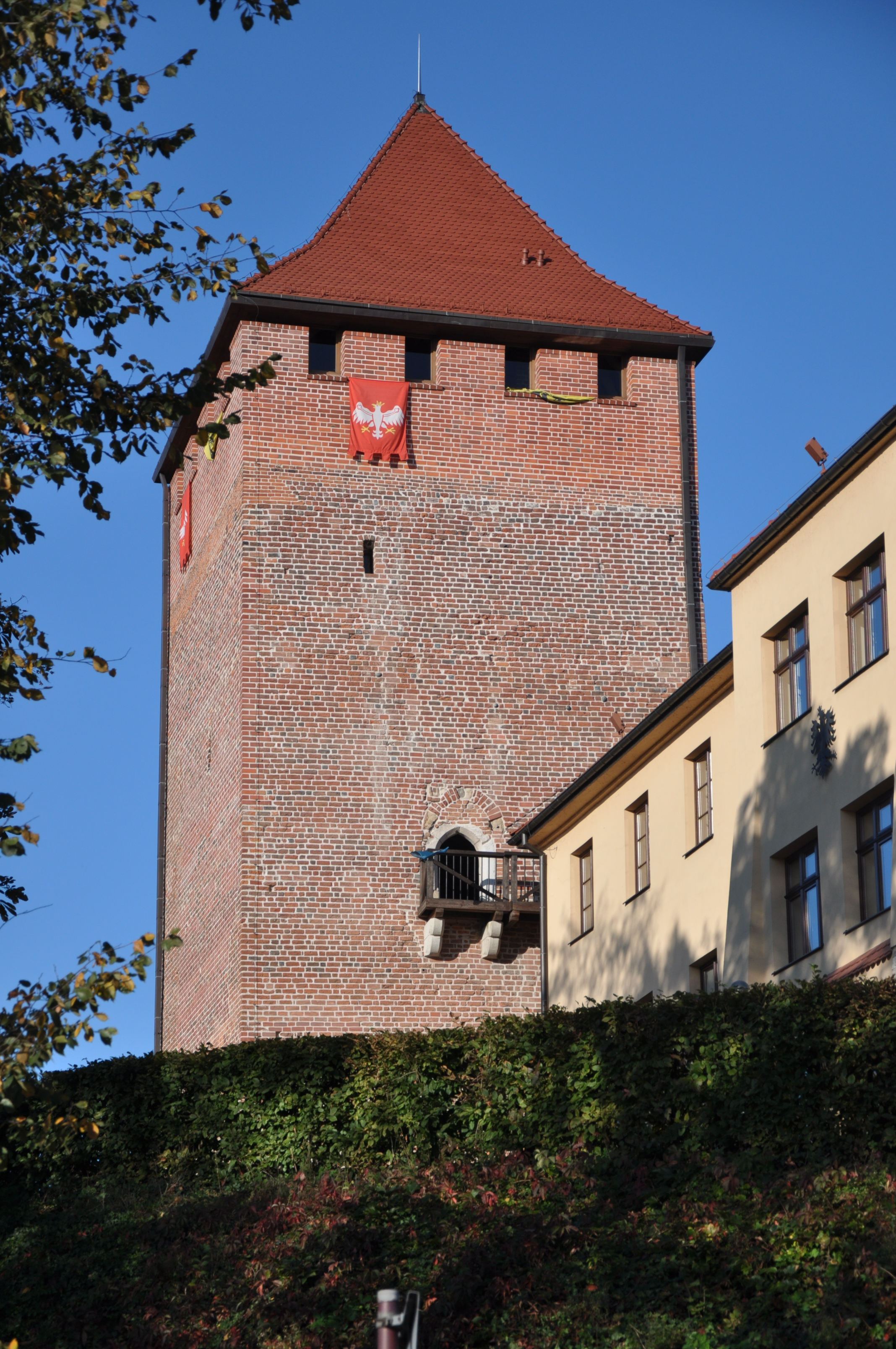 zamek Oświęcim, Oświęcim